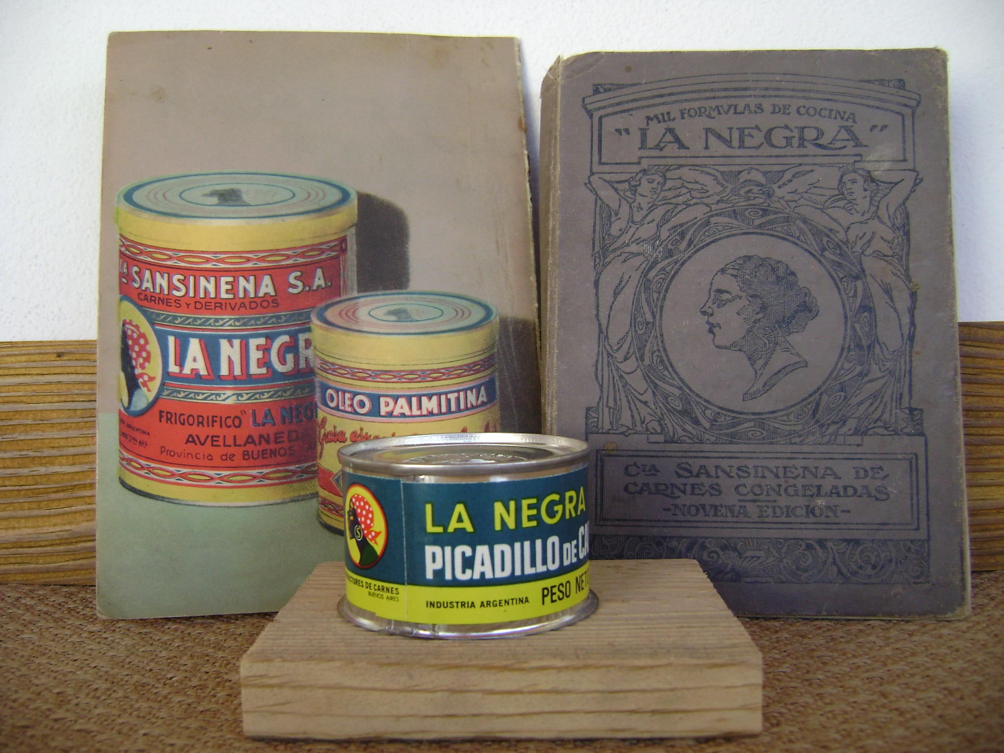 Fotografía de libros de cocina editados por "La Negra" y envase original de un producto elaborado por la misma compañia